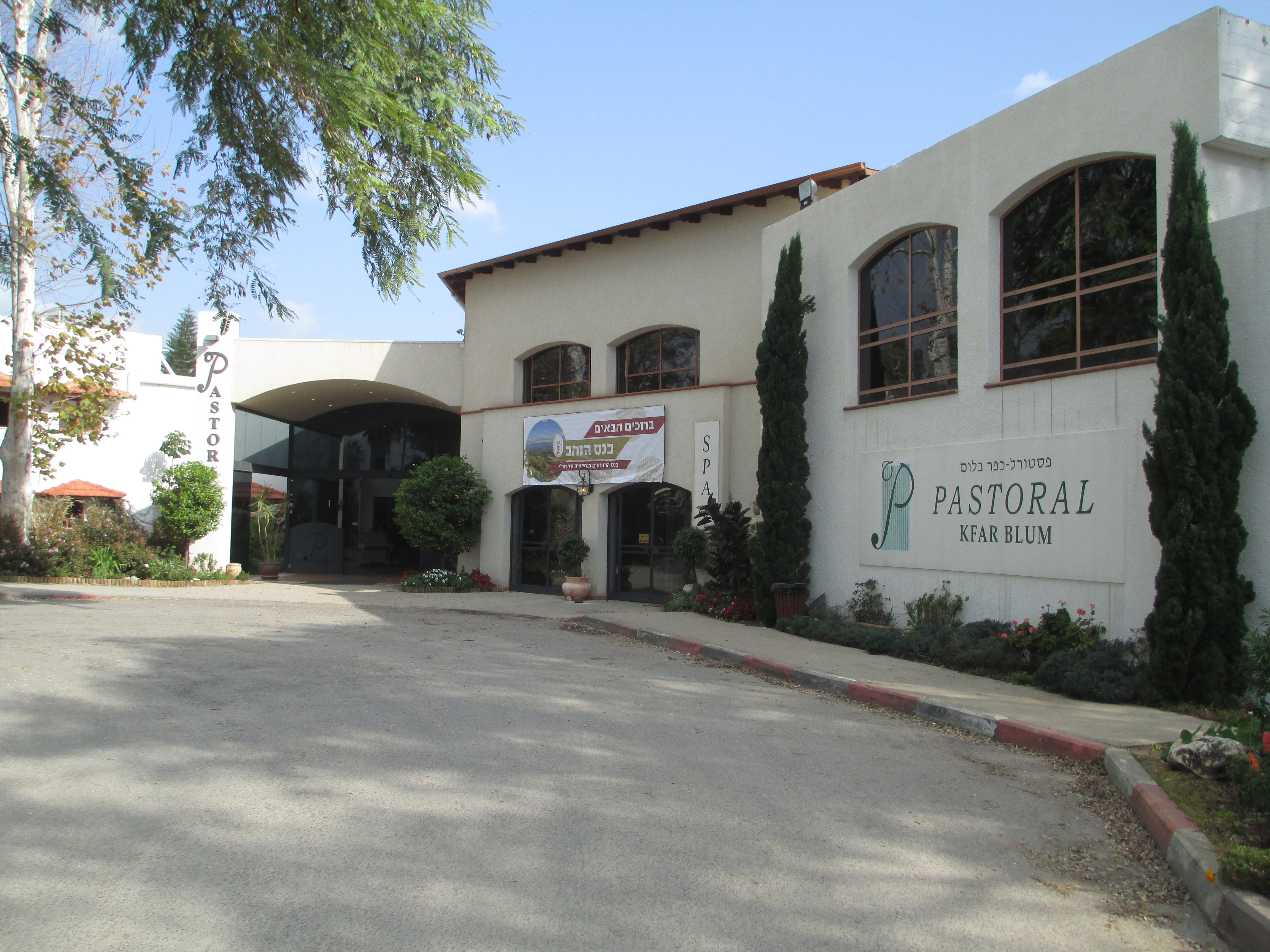 מלון פסטורל בכפר בלום